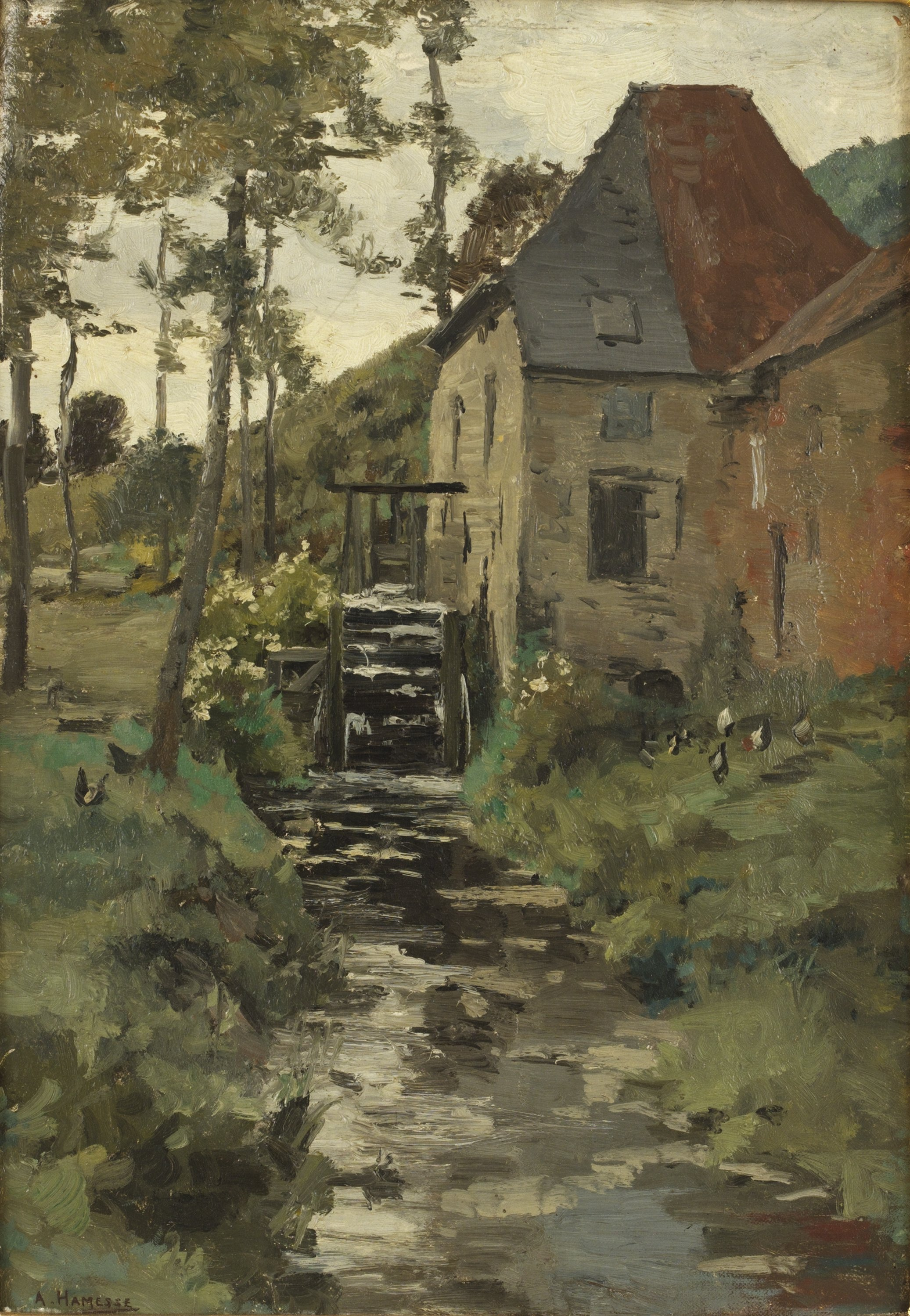 De Moulin d'Hoeylandt